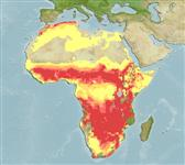 Angersäga levikukaart